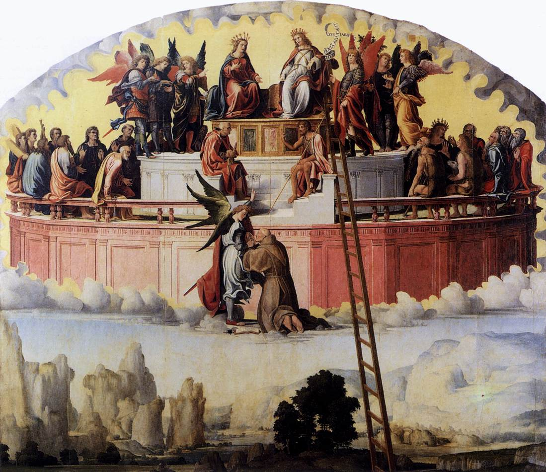 Il dipinto si riferisce alle visioni del Beato Amedeo da Silva contenute nel libro Apocalypsis Nova ove si parla di un papa angelicato che avrebbe condotto il mondo verso un’era di pace e di sette santi arcangeli identificati in Michele, Gabriele, Raffaele, Uriele, Sealtiele, Geudiele, Barachiele. Costoro precedono ogni altro spirito del loro genere. – Marcello Stanzione e Carmine Alvino, Inchiesta su Uriele: l’Arcangelo scomparso, Tavagnacco, Edizioni Segno, 2011, p. 10.